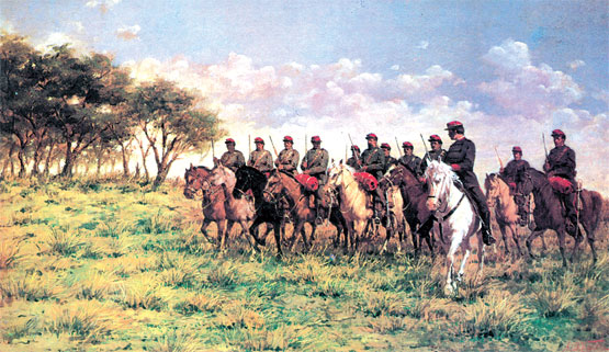 Ángel Della Valle nació en Buenos Aires en 1852. Realizó sus primeros estudios artísticos en esta ciudad y se perfeccionó en Florencia bajo la dirección de Ciseri. Desde su regreso a la Argentina se dedicó a la enseñanza artística en la academia de la Asociación Estímulo de Bellas Artes, donde formó alumnos de la categoría de Boggio, Daneri y Victorica. Simultáneamente, realizaba su obra de pintor retratista y autor de lienzos inspirados por el campo argentino. Participó de las exposiciones organizadas por el Ateneo, donde se distinguió con cuadros tales como La vuelta del malón (1892), que le dieron celebridad. Falleció en Buenos Aires en 1903.